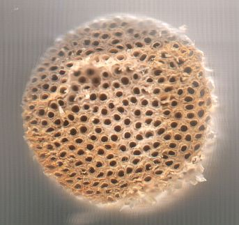 Rattan cane / Querschnitt eines Rattan-Stabes.